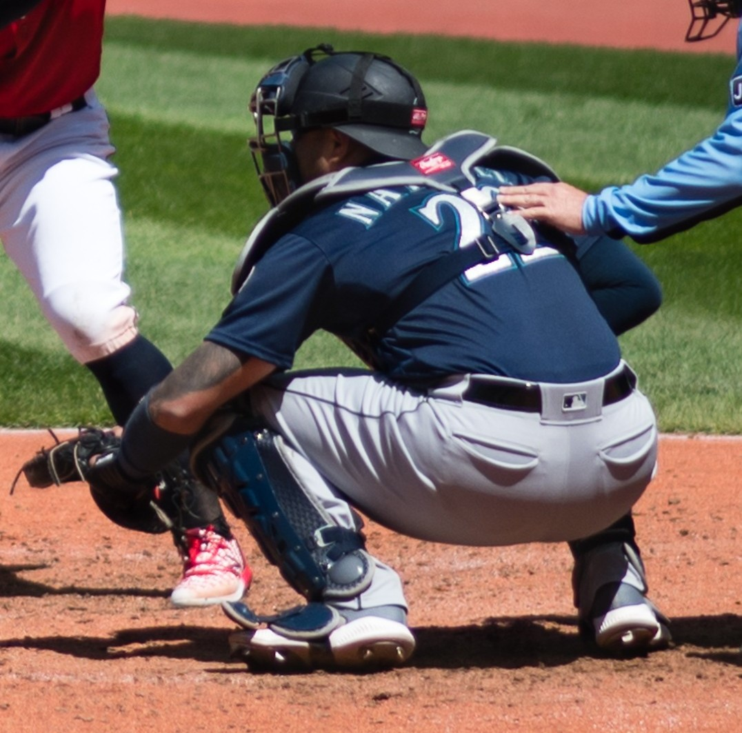 Seattle Mariners VS. Cleveland Indians